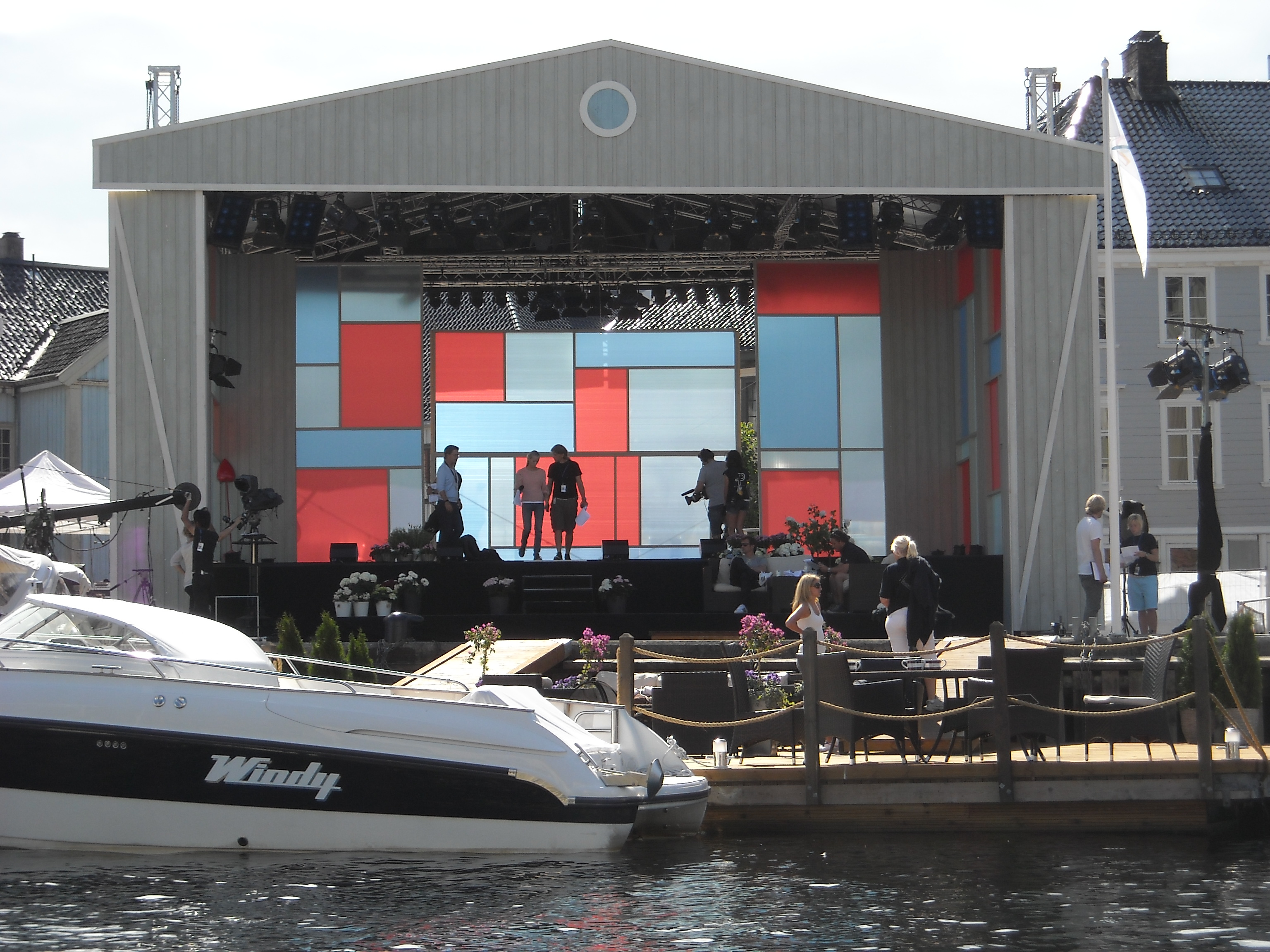 Scenen til Sommerspillet i Arendal, 2010